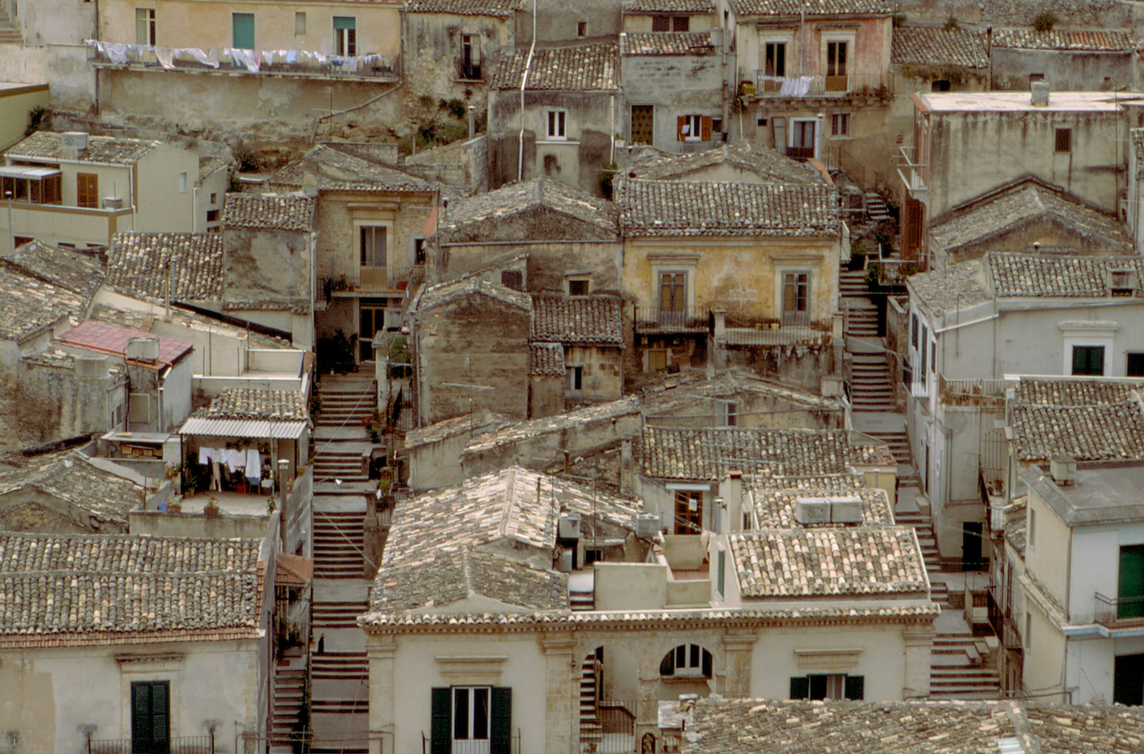 modica_82-4